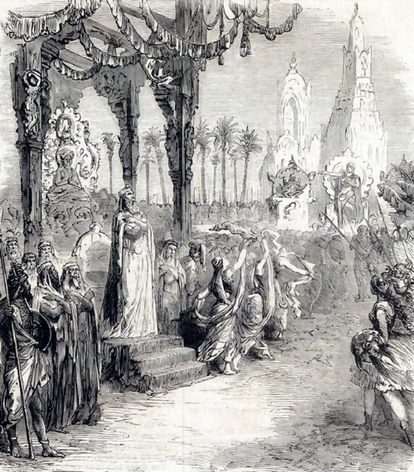 Acte IV de L'Africaine de Meyerbeer